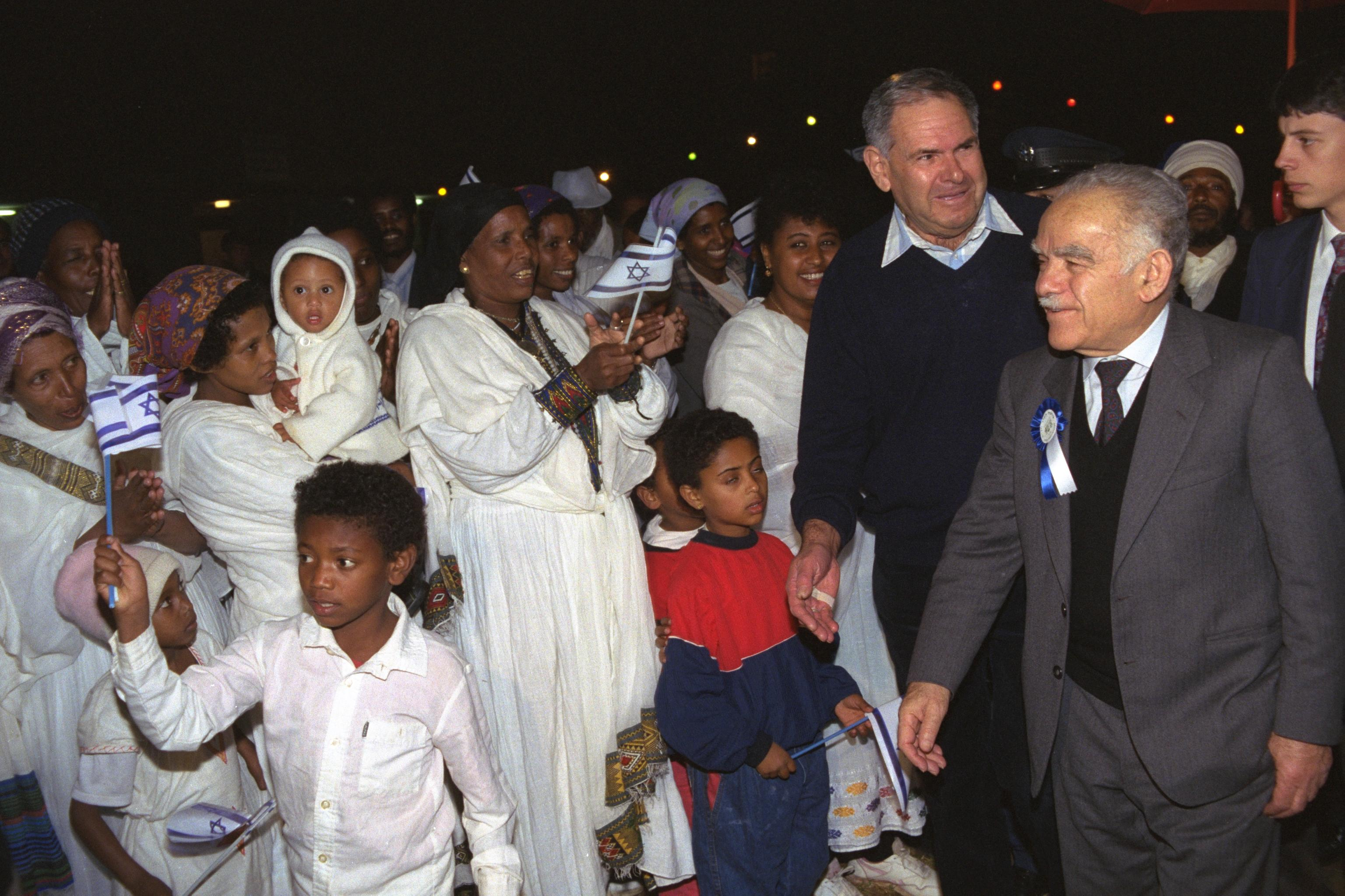 PM Yitzhak Shamir (R) Greets new immigrants from Ethiopia at a Hedera Absorption Center. יצחק שמיר מברך עולים חדשים מאתיופיה במרכז הקליטה בחדרה Photograph: ISRAELI TSVIKA, GPO. 09/01/1991 .